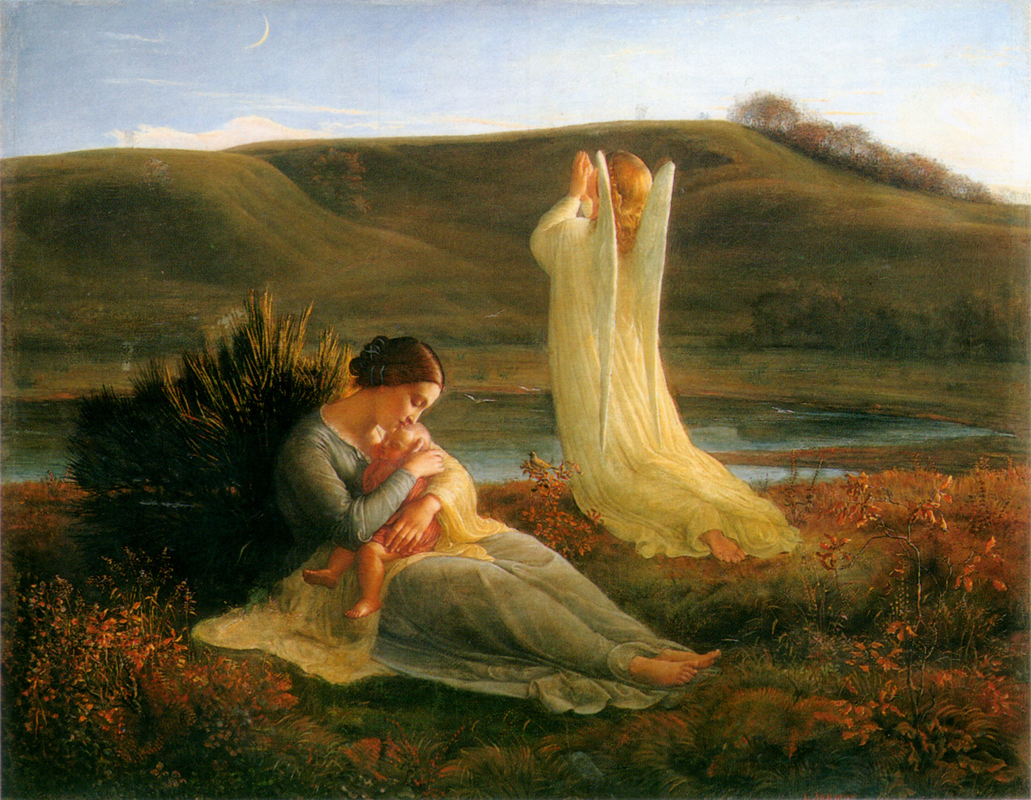 Poème de l'âme (3)